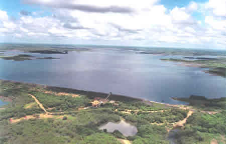 La Presa El Pueblito es la reserva de agua del Municipio Pedro Zaraza, que se encuentra mas al oeste de la ciudad de Zaraza, Venezuela, esta masa de agua es usada tanto para la agricultura como para el turismo.